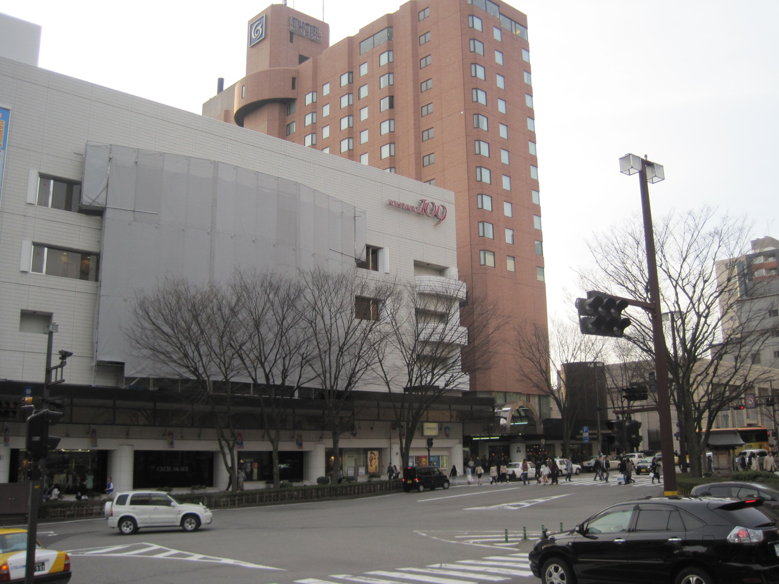 石川県金沢市の繁華街「香林坊」。